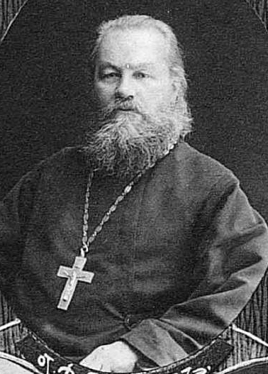 Отец Дмитрий Яковлевич Попов (псевдонимы Д. Пунимов и Д. Я. Подов; 3 мая 1863, Вологодская губерния — 9 октября 1921, Автономная область Коми) — священник, депутат IV Государственной думы от Вологодской губернии (1912—1917).